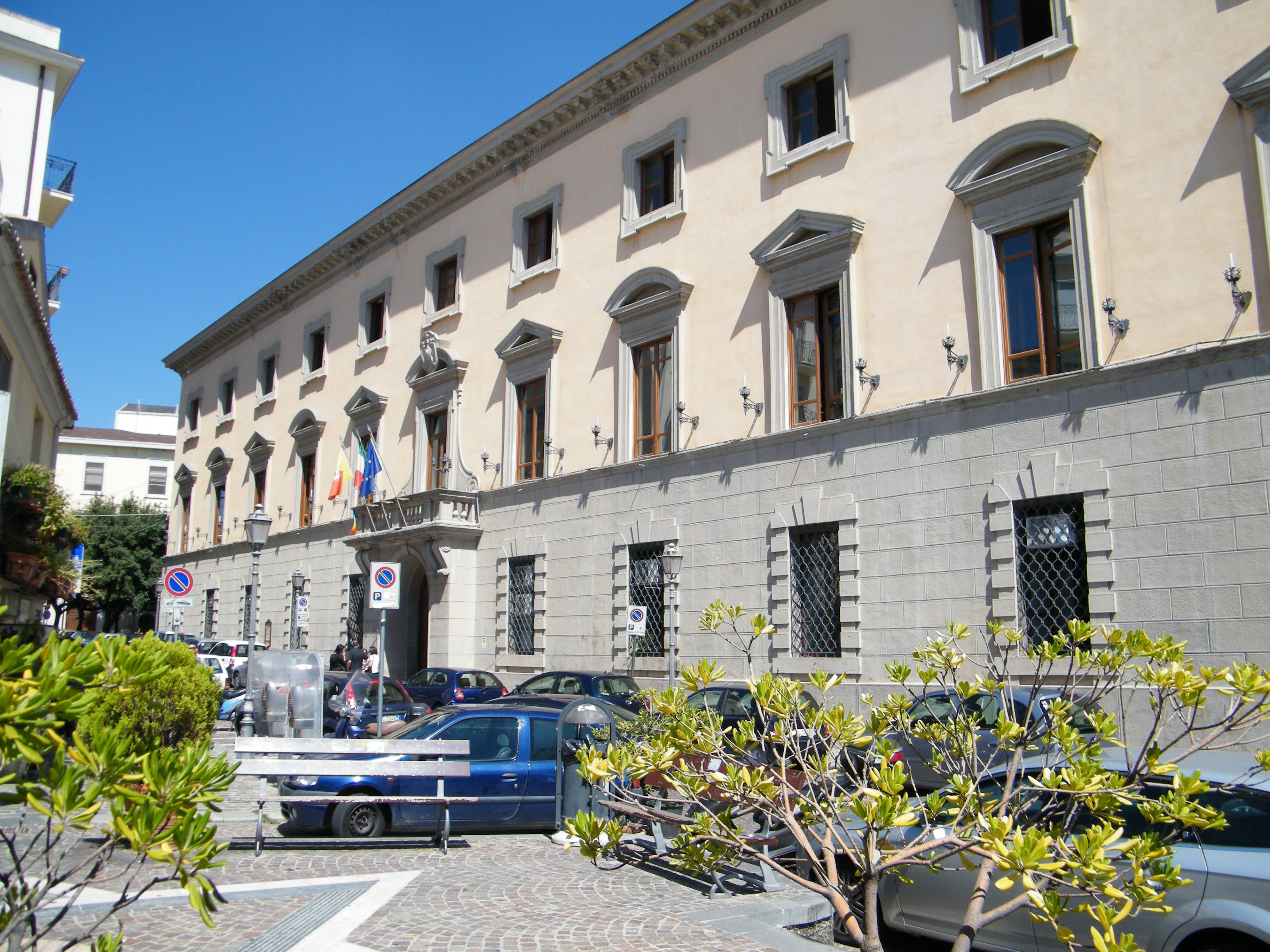 Palazza De Nobili, sede dell'amministrazione comunale. Vista da sinistra.